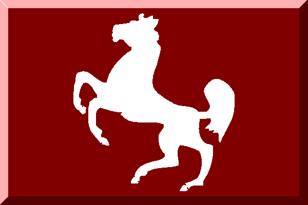 Fantasy flag